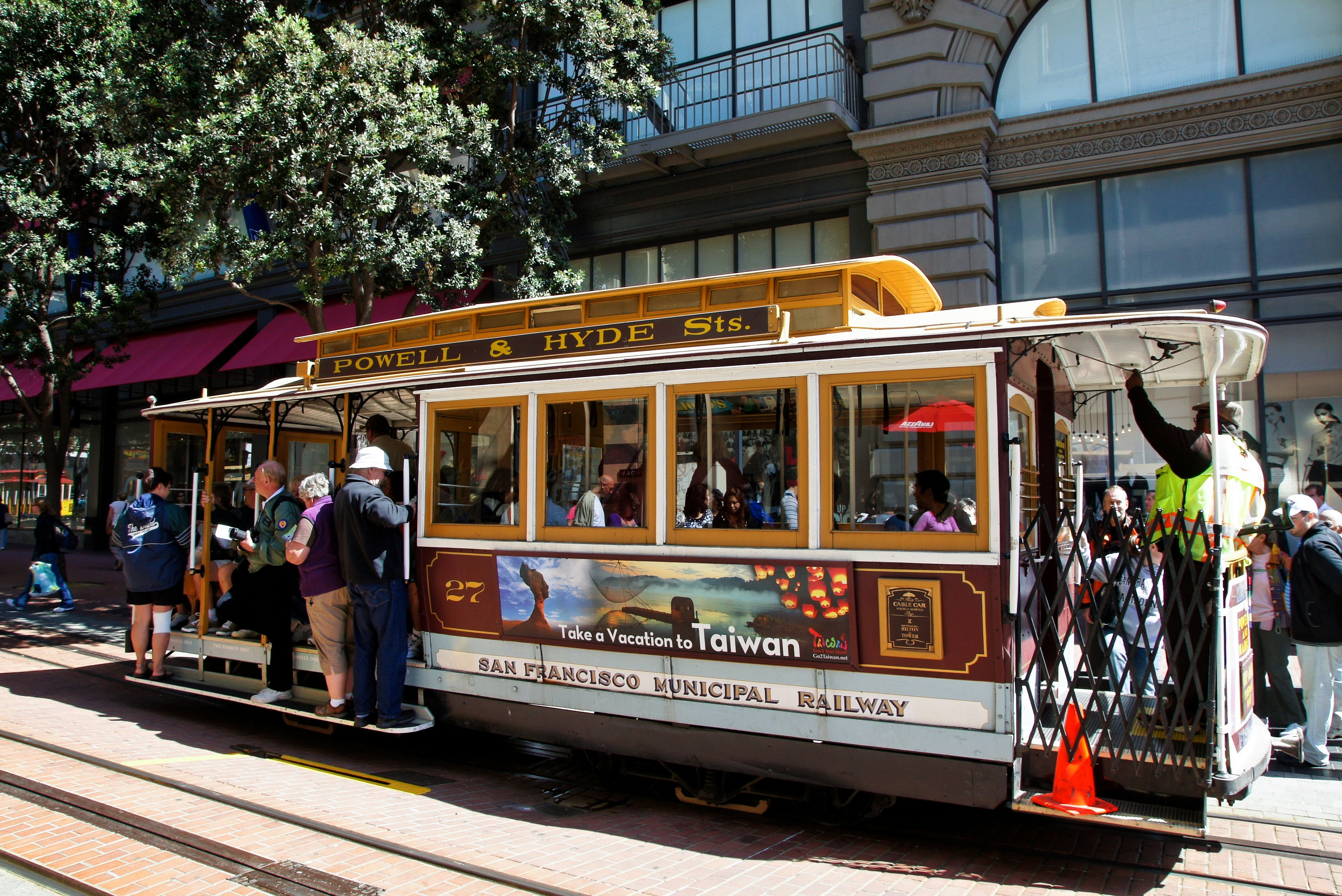 Le cable car à San Francisco